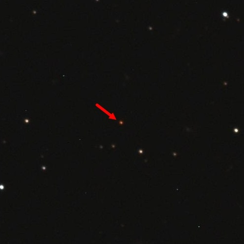 Diese Farbaufnahme des Quasars APM 08279+5225 mit einer Rotverschiebung z=3.911 wurde am 9. März 2010 mit dem 60cm Reflektor Teleskop des Lohrmann-Observatoriums (TU Dresden) auf der Außenstelle Triebenberg gewonnen. Dazu wurden mehrere Einzelaufnahmen in den Wellenlängenbereichen rot, grün und blau kombiniert. Das Objekt befindet sich in einer Entfernung von ca. 13 Milliarden Lichtjahren.